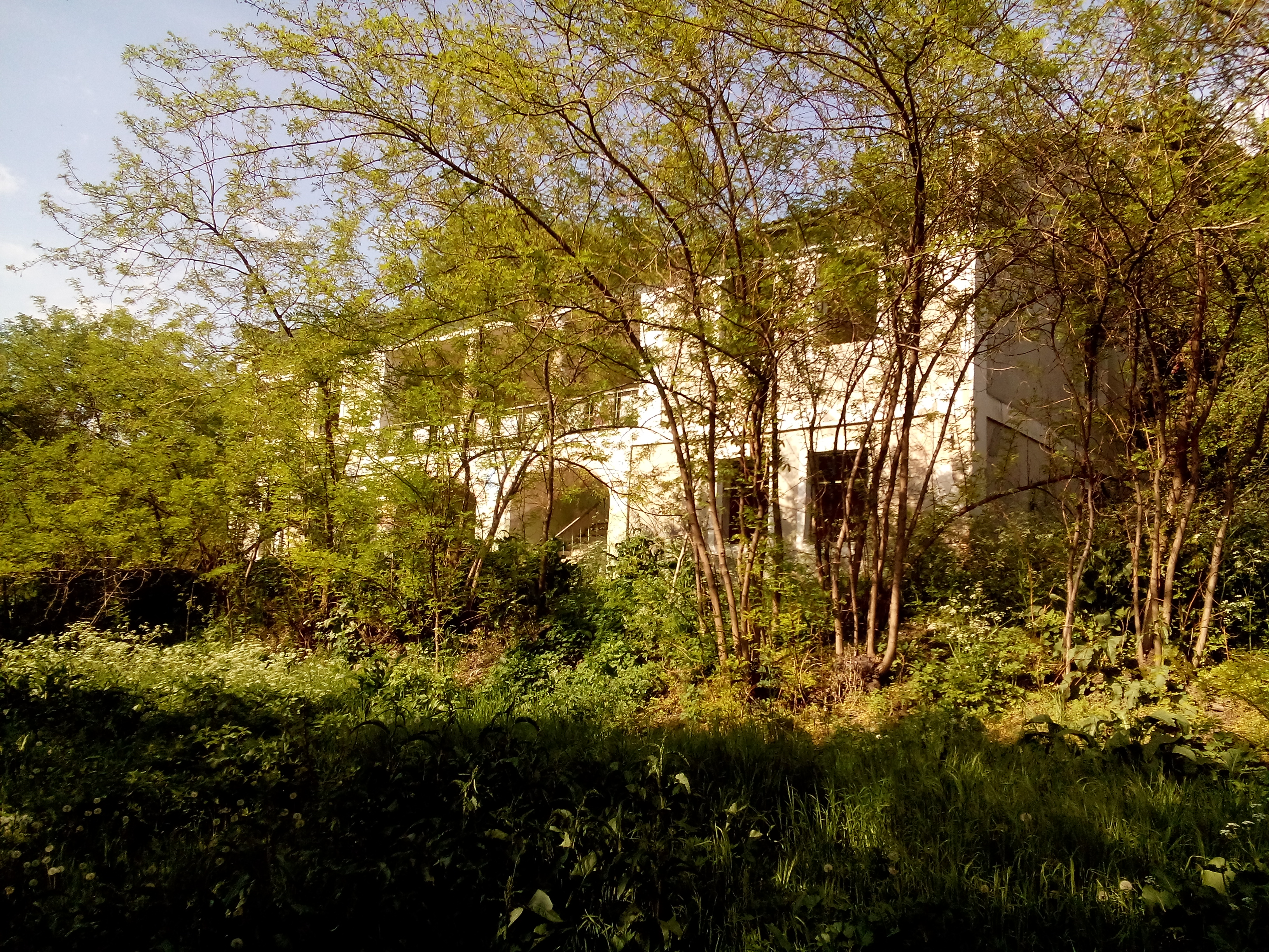 Conacul lui Dinu Ruso din Păulești, raionul Călărași